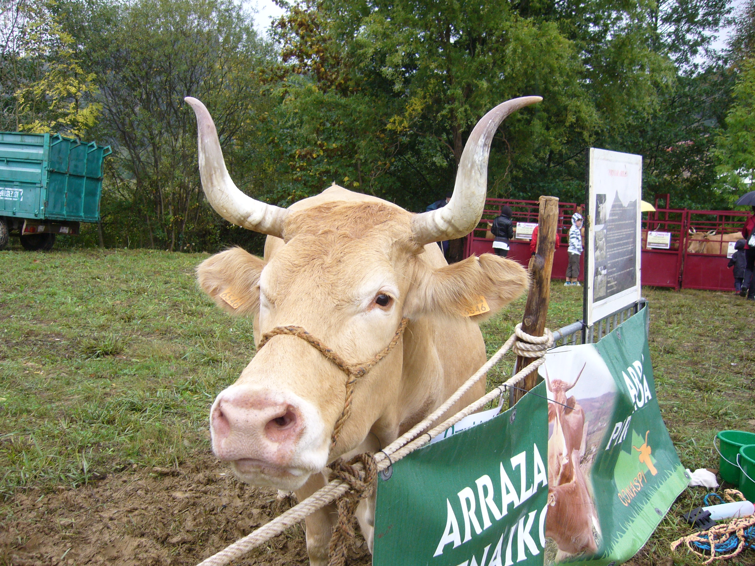 Piriniar behia.Burua